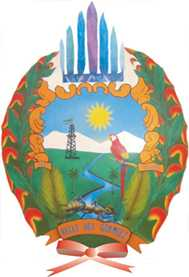 Escudo Valle del Guamúez